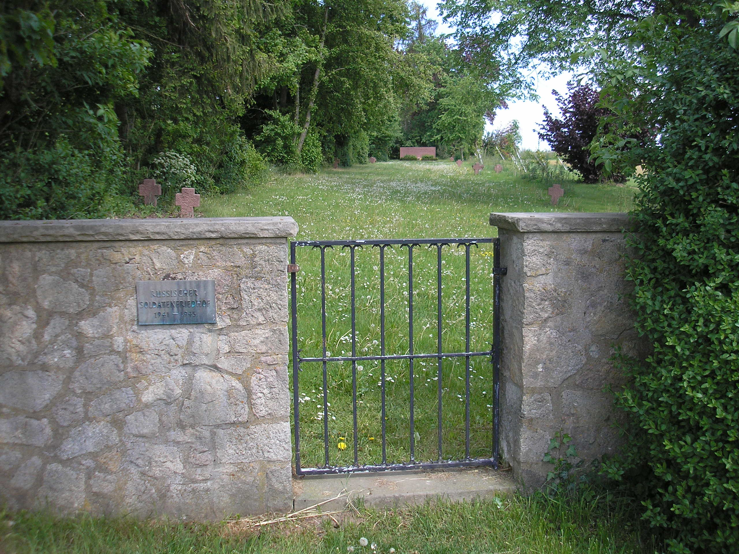 Eingangsbereich